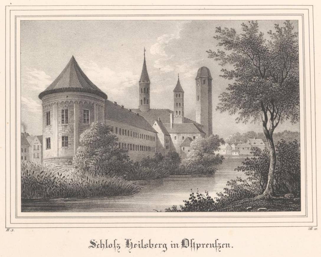 Ansicht Schloss Heilsberg in Ostpreußen. Lithographie von Teichgräber